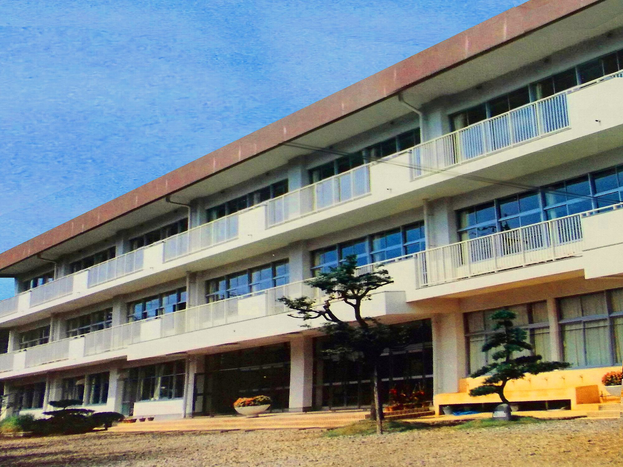 1980年新校舎竣工当時。